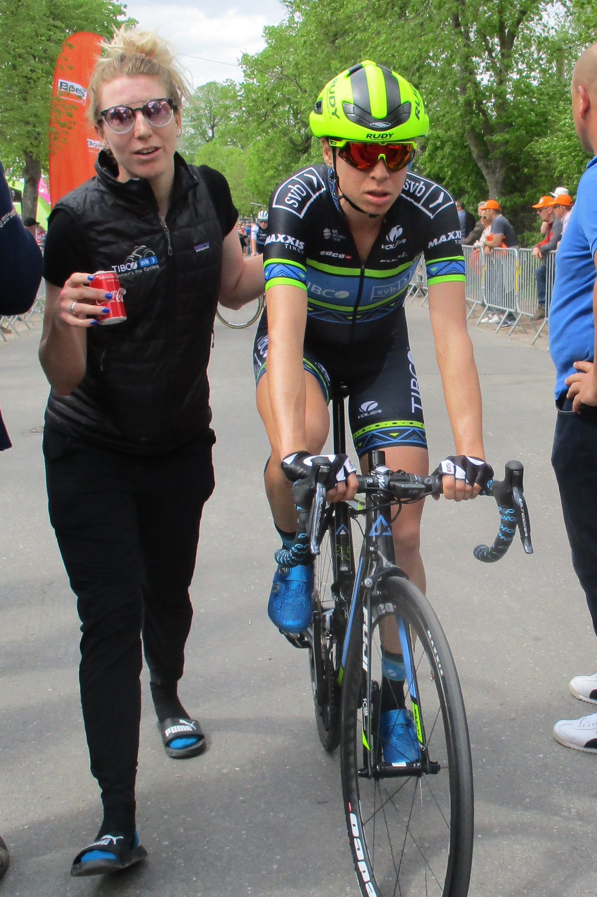 Finish van de Waalse Pijl 2019 voor vrouwen op de Mur de Huy